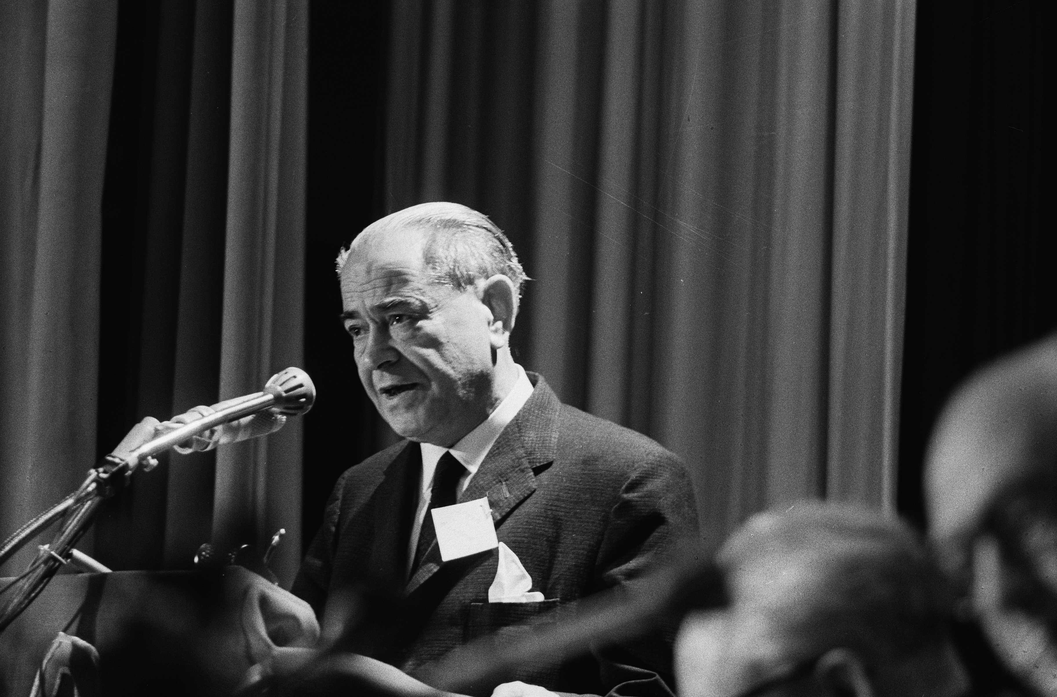 Collectie / Archief : Fotocollectie Anefo Reportage / Serie : [ onbekend ] Beschrijving : Het congres van de SAI te Amsterdam. Dhr. Llopis namens de Spaanse socialisten Datum : 10 september 1963 Locatie : Amsterdam, Noord-Holland Trefwoorden : SOCIALISTEN, congressen Fotograaf : Pot, Harry / Anefo Auteursrechthebbende : Nationaal Archief Materiaalsoort : Negatief (zwart/wit) Nummer archiefinventaris : bekijk toegang 2.24.01.05 Bestanddeelnummer : 915-5132